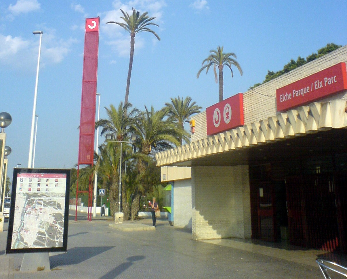 Estación de Elche Parque, (Alicante, España)